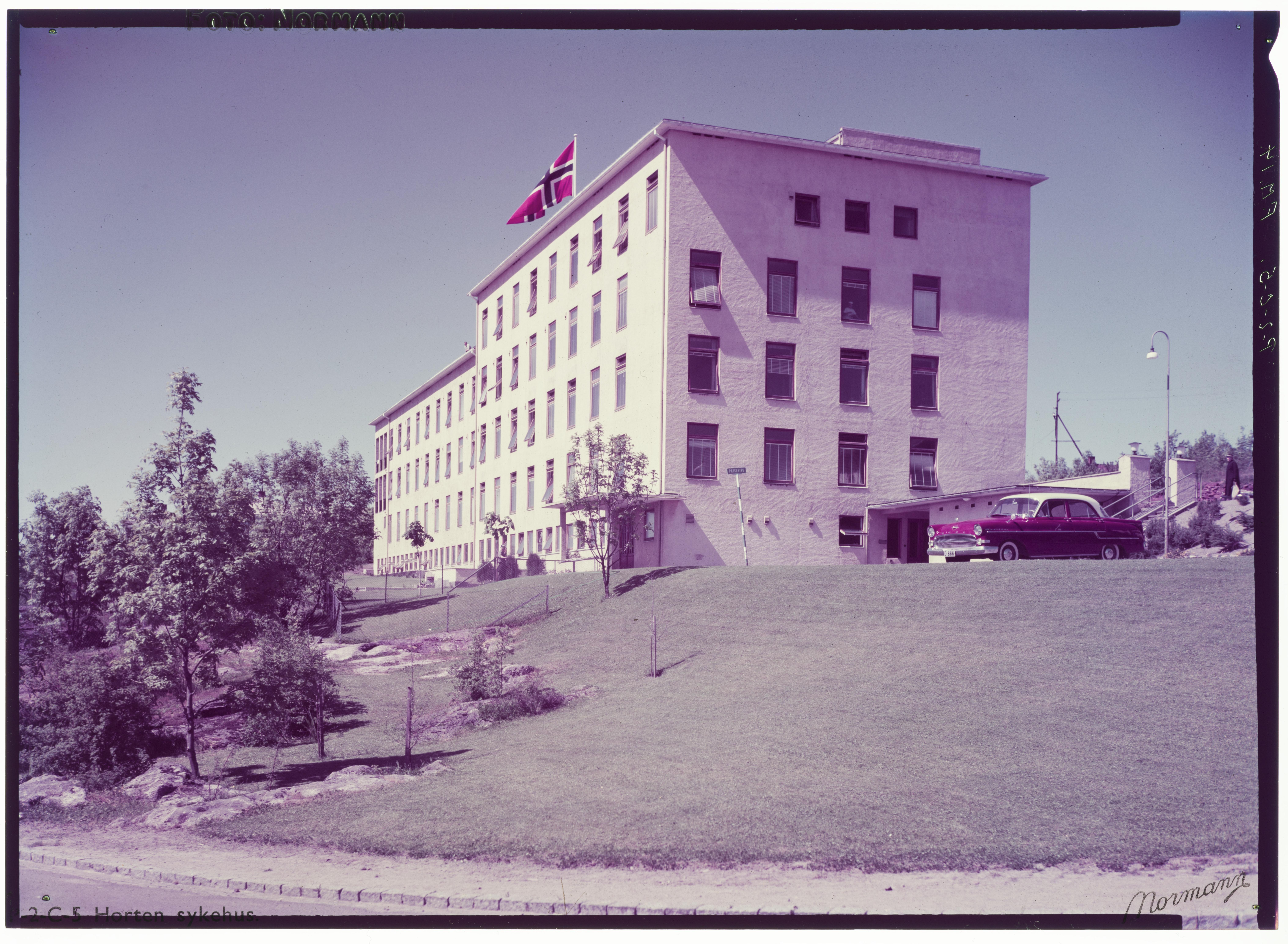 Bildet er hentet fra Nasjonalbibliotekets bildesamling. Anmerkninger til bildet var: Tittel er hentet fra emballasje. Horten, Horten, Vestfold